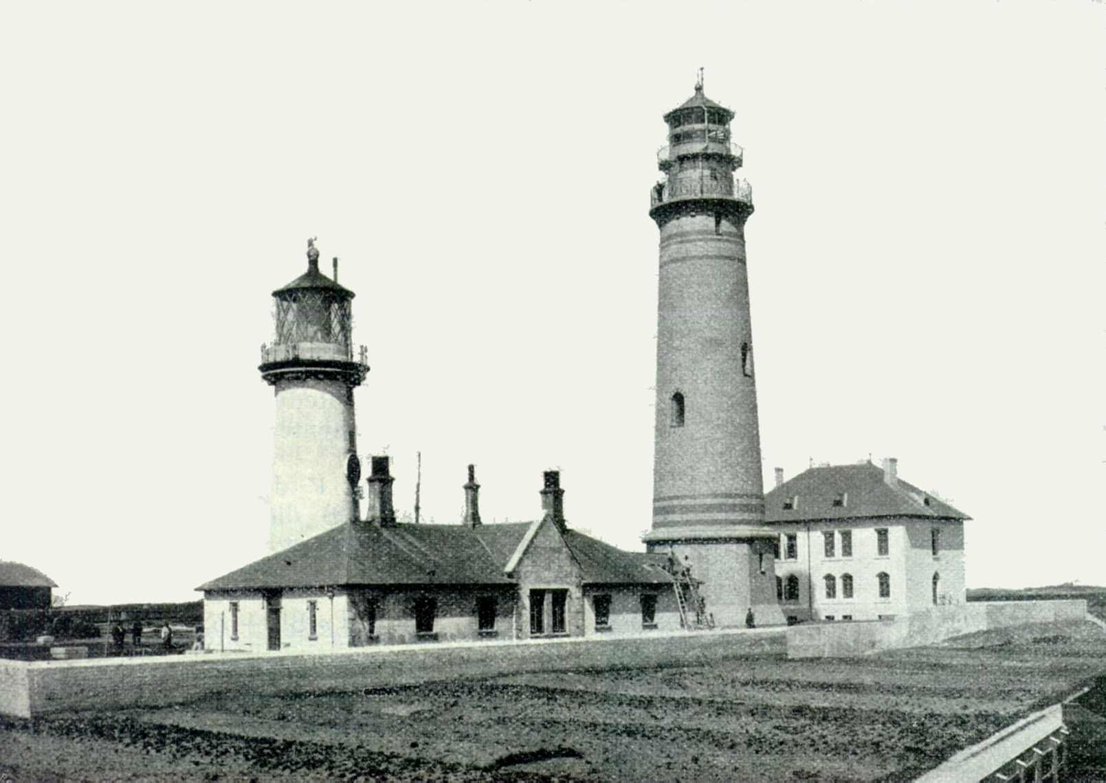 Helgoländer Leuchttürme 1903: links der 1811 unter englischer Herrschaft erbaute Leuchtturm, abgebrochen bald nach der Errichtung des neuen Leuchtturmes 1902. Letzterer 1945 zerstört